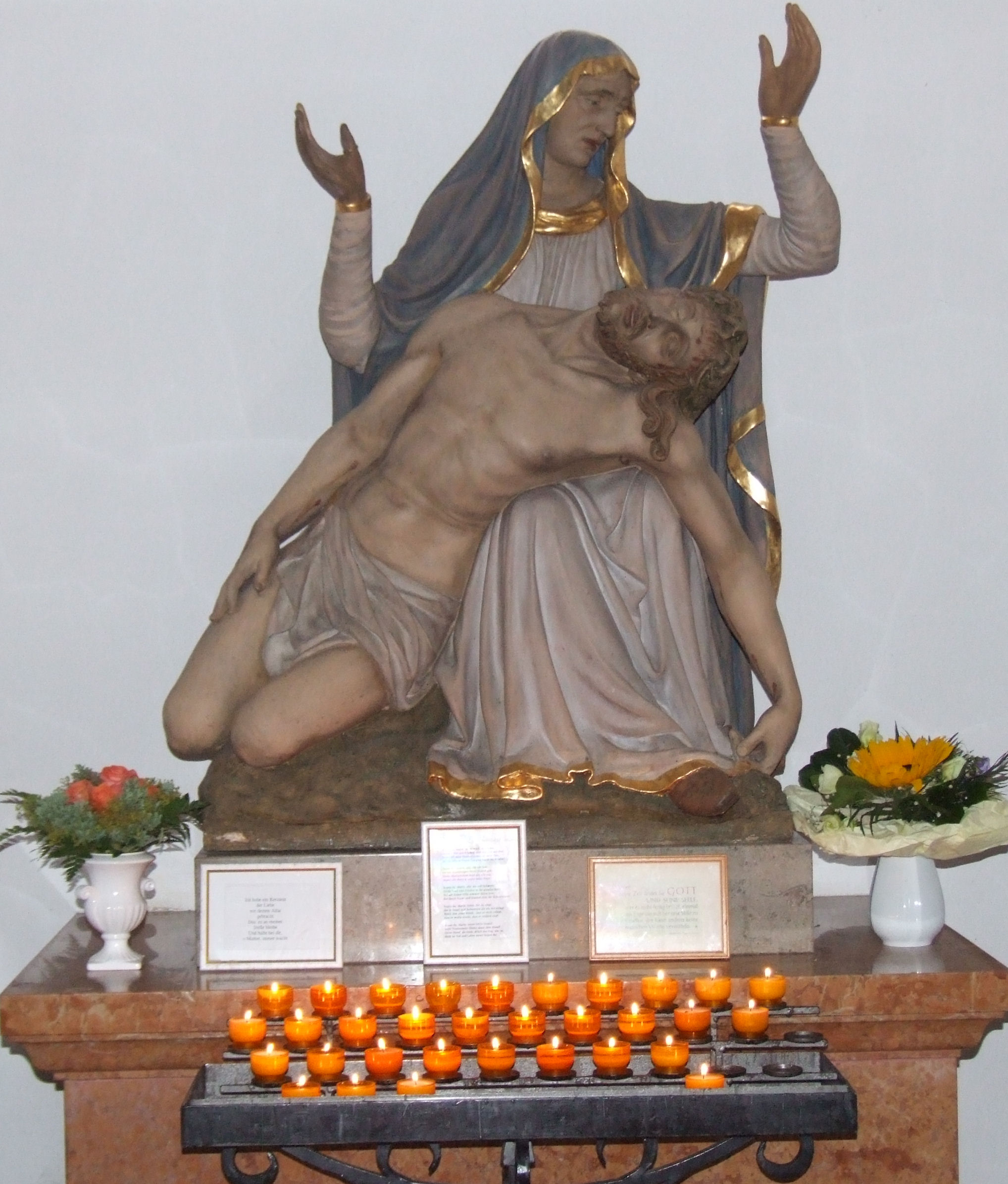 Pfarrkirche St. Vitus in Löningen